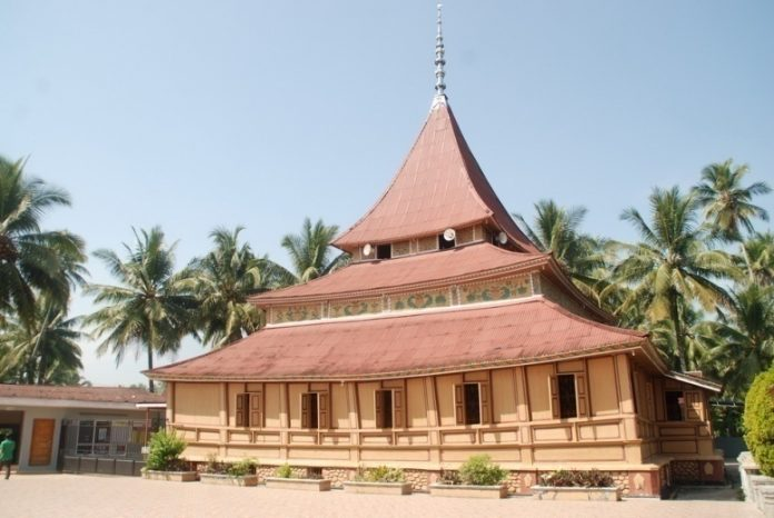 Masjid Gadang Balai Nan Duo